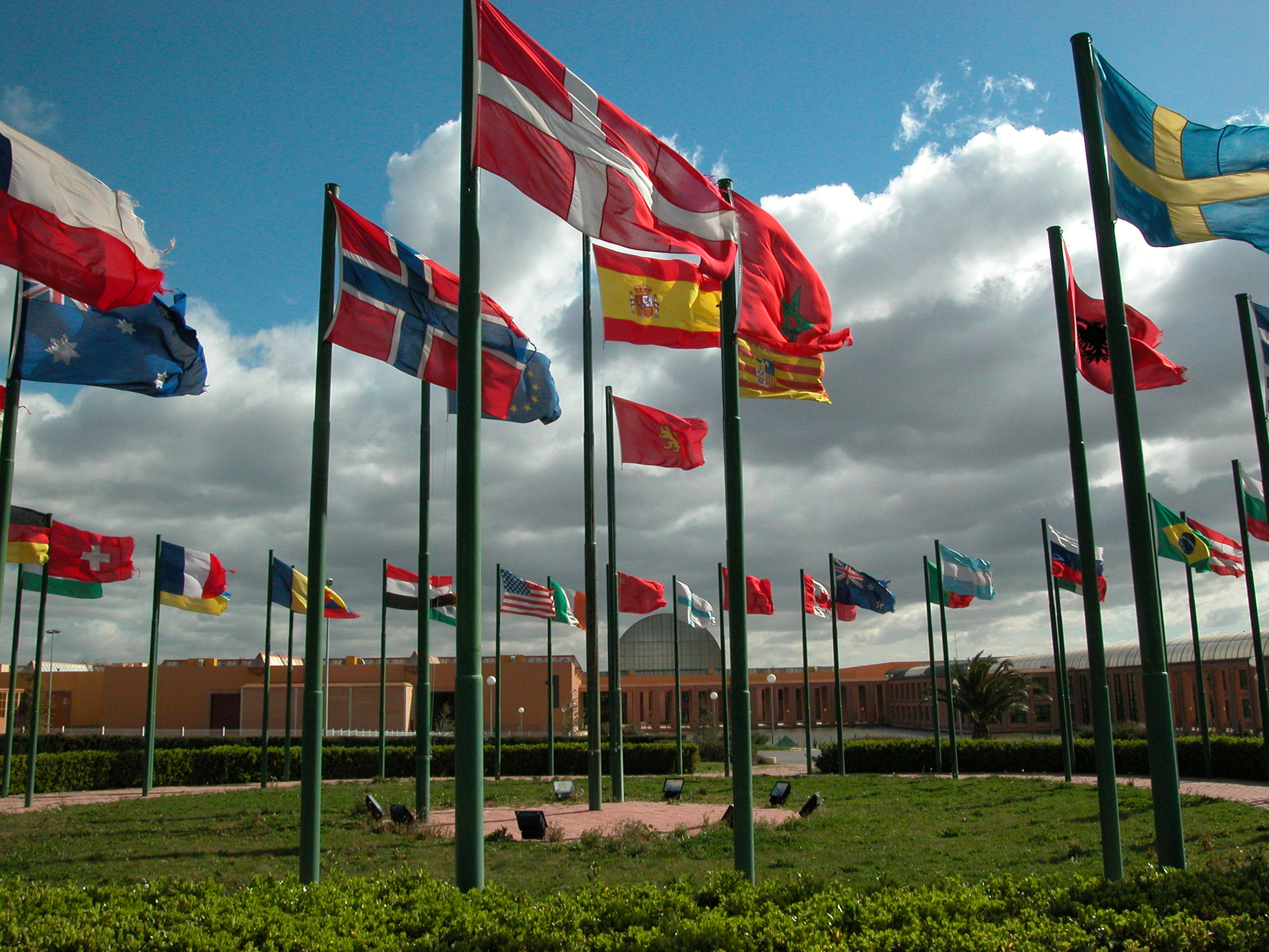 Acceso principal al Recinto ferial.